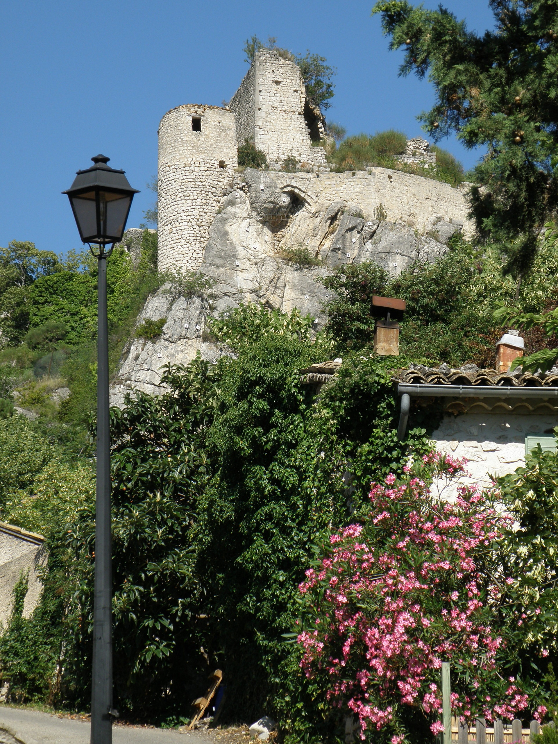 La Roche-sur-le-Buis (Drôme, France). Château.